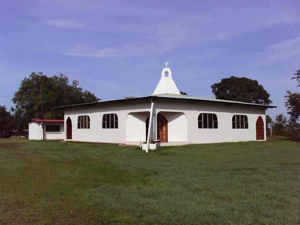 Iglesia Católica Fundada en 1986 en Las Cruces de Los Santos en Panamá. Pertenece a La Diosesis de Chitré, actualmente Monseñor Marcelino García la administra.